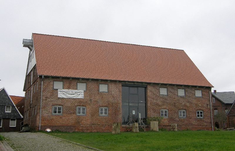 Bild aus Freiburg (Elbe)